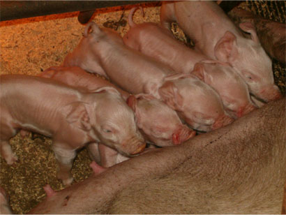 Oryginalny opis: "Świnia domowa wbp x pbz. Zdjęcie zrobione przeze mnie w sierpniu 2004 roku podczas praktyk zootechnicznych w gospodarstwie p. Kosińskiego w okolicach Wielunia. Przedstawia jednodniowe prosięta z maciory wbp krytej knurem wbp x pbz."